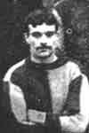 Альф Фарман